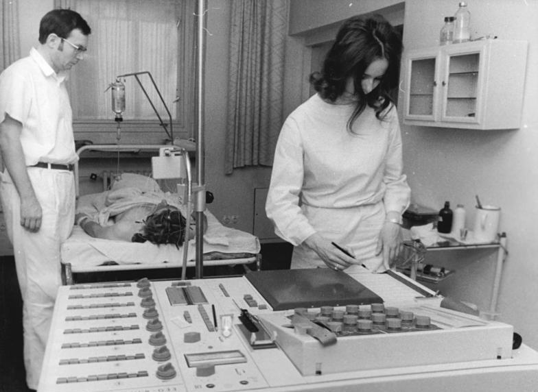 ADN-ZB Katscherowski 23.3.73 Berlin: Fünf Jahre Zentrale Rettungs- und Intensivtherapieabteilung- Oberarzt Dr. Günter Grünewald und EEG-Assistentin Brigitte Rieß registrieren am Achtkanal-Elektronenzephalographen aus Zwönitz die Hinrströme eines Unfallpatienten mit einer Schädelverletzung. In der ZRI des Städtischen Krankenhauses Berlin Friedrichshain werden jährlich mehr als 13 500 Patienten ärztlich behandelt. Genau 5 Jahre arbeitet in diesem Monat die ZRI als erste interdisziplinäre Therapieeinrichtung in der DDR: hier werden Schwerkranke durch Ärzte verschiedener Fachrichtungen wirksam behandelt und versorgt.